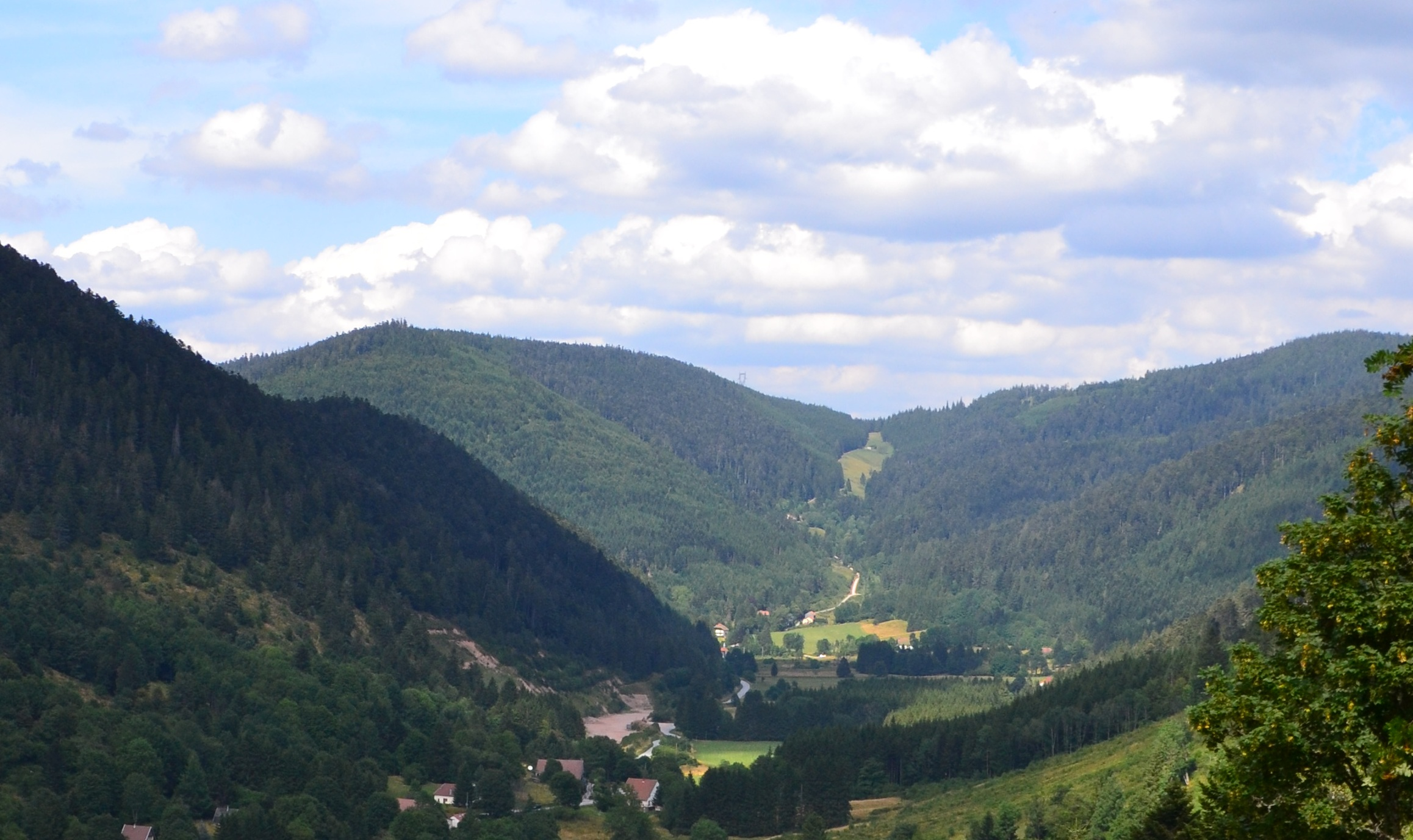 La vallée du ruisseau du Louschbach (au fond) vue depuis le village du Valtin.